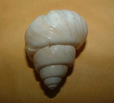 Document réalisé par moi même, libre de droit en lice"nce GNU. Jtanganyika 3 juillet 2006 à 16:09 (CEST) Licensing Jtanganyika 19 juillet 2006 à 00:06 (CEST)